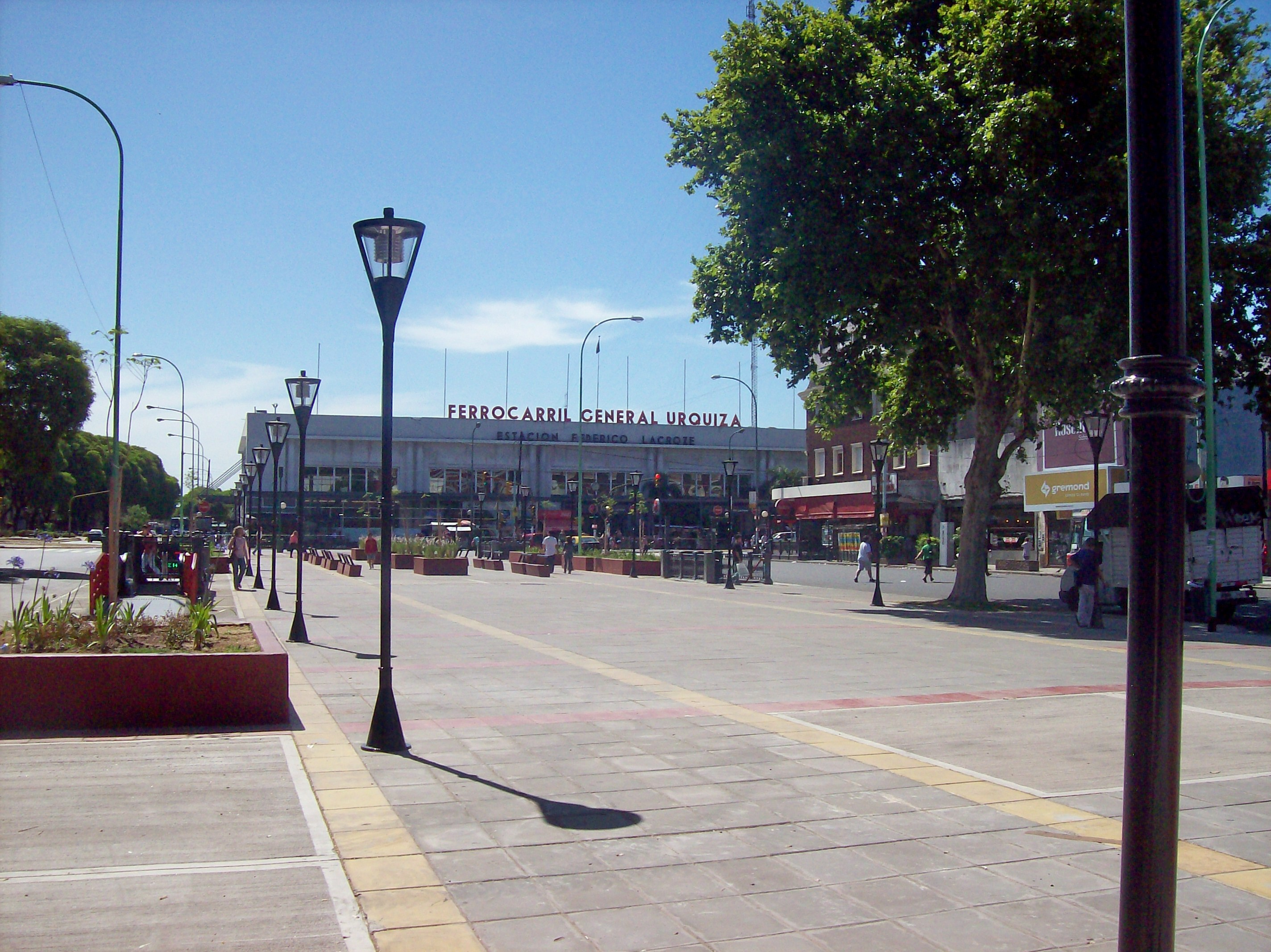 Avenida Corrientes, en Chacarita, Bs. As. y Estación Lacroze, del Ferrocarril Urquiza